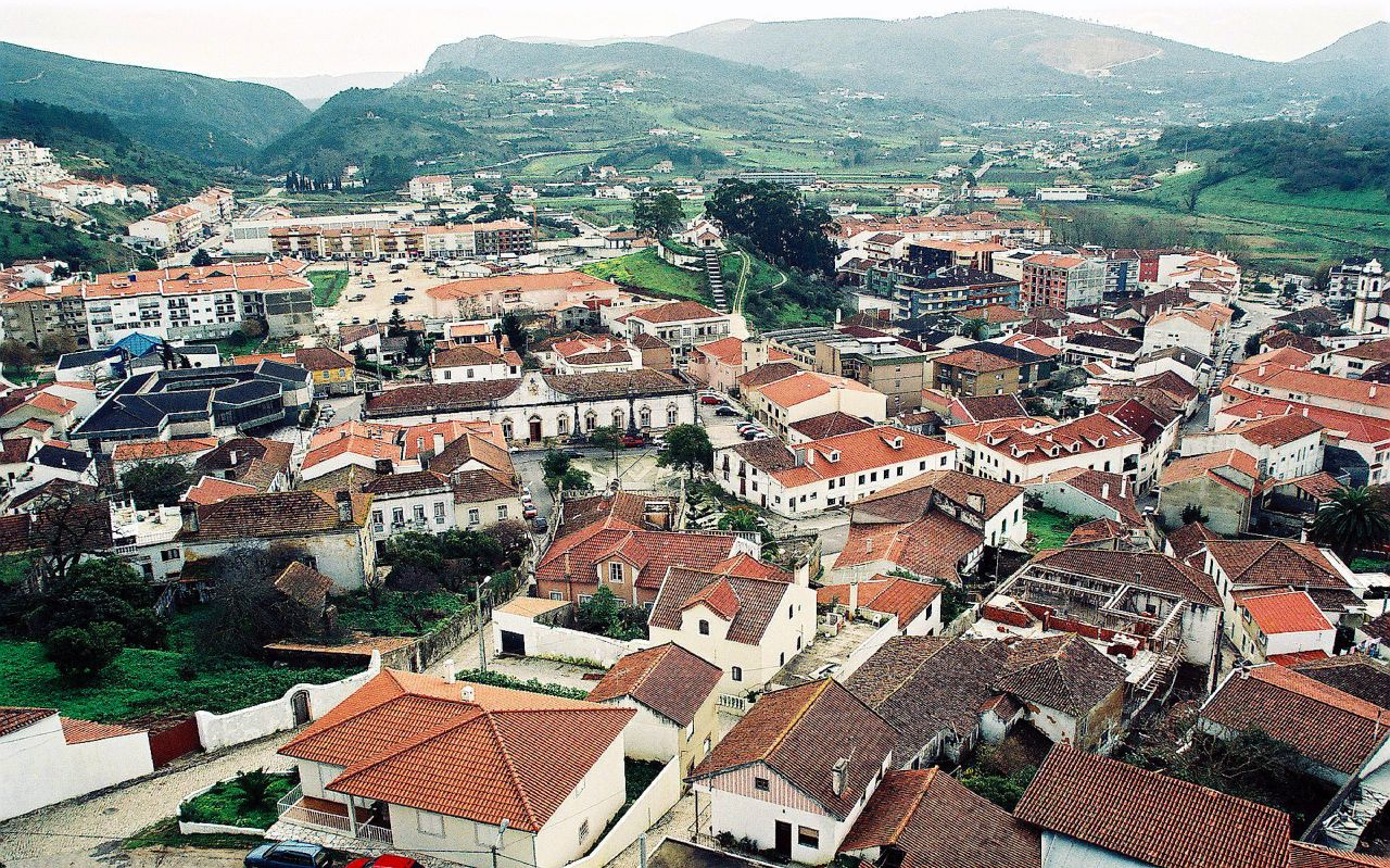 A vila vista do seu castelo.